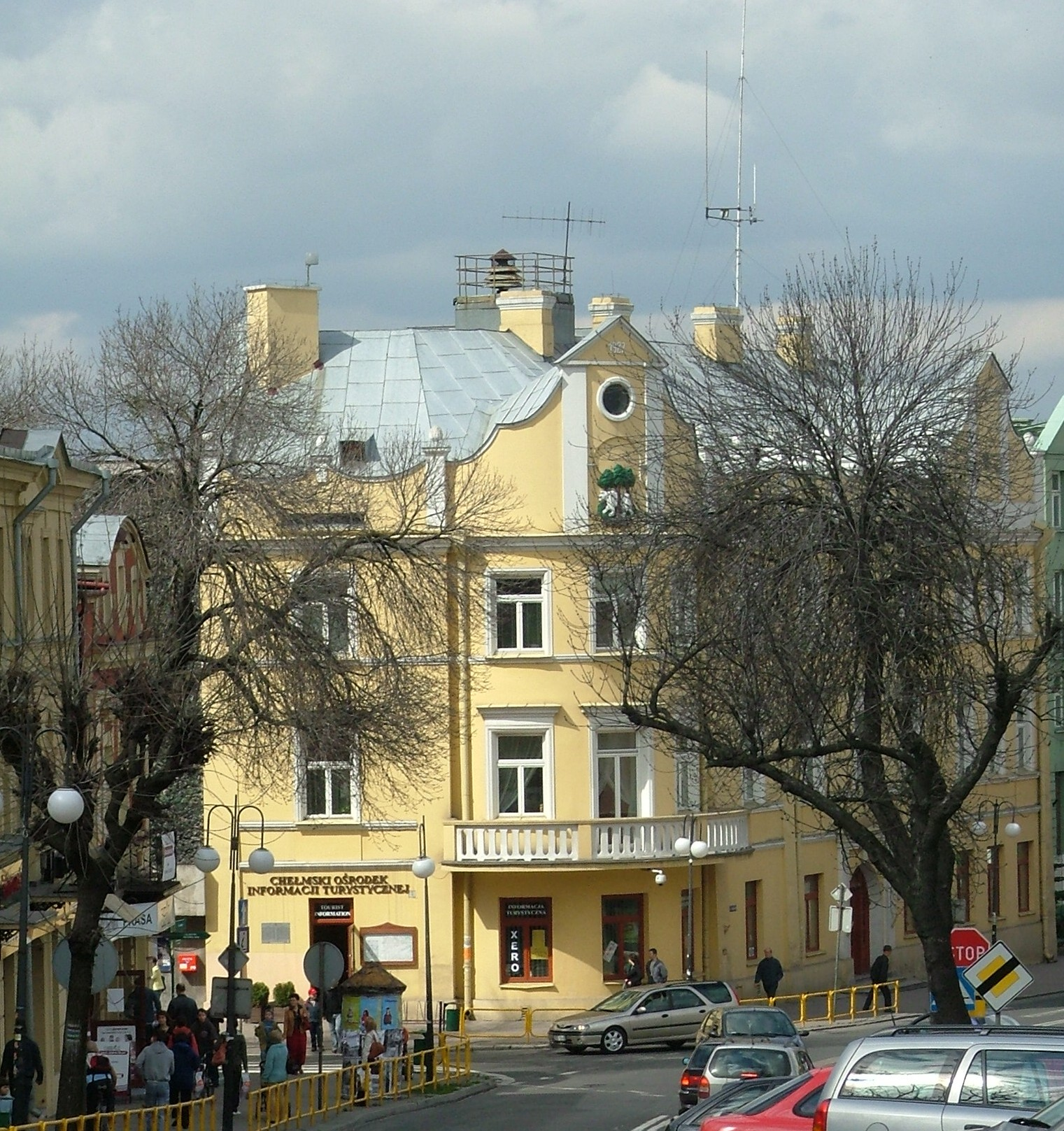 Chełm, Magistrat, ul. Lubelska {